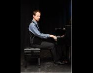 Fotografía de Michael Davidov, pianista de Israel-España, durante el XXXIII Concurso Internacional de Piano Delia Steinberg, celebrado en Madrid en 2014.